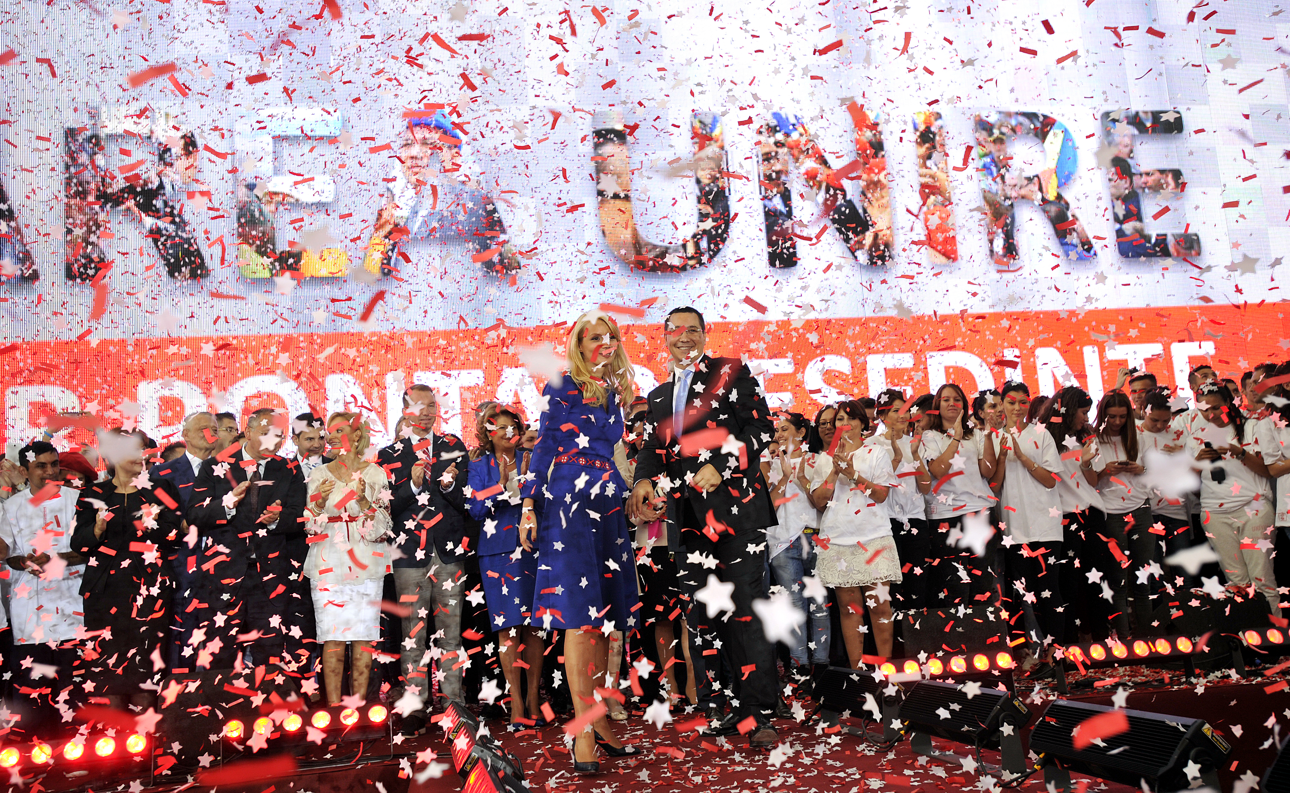 Lansarea candidaturii lui Victor Ponta la alegerile prezidentiale din 2014 - 20.09 (43)